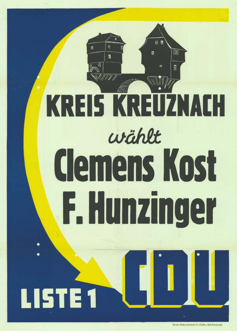 Kreis Kreuznach wählt Clemens Kost F. Hunzinger Liste 1 CDU Abbildung: Gebäudegrafik Plakatart: Kandidaten-/Personenplakat ohne Porträt Drucker_Druckart_Druckort: Plakat-Zentrale Fr. Fiedler, Bad Kreuznach Objekt-Signatur: 10-010 : 162 Bestand: Landtagswahlplakate Rheinland-Pfalz (10-010) GliederungBestand10-18: Landtagswahlplakate Rheinland-Pfalz (10-010) » CDU Lizenz: KAS/ACDP 10-010 : 162 CC-BY-SA 3.0 DE